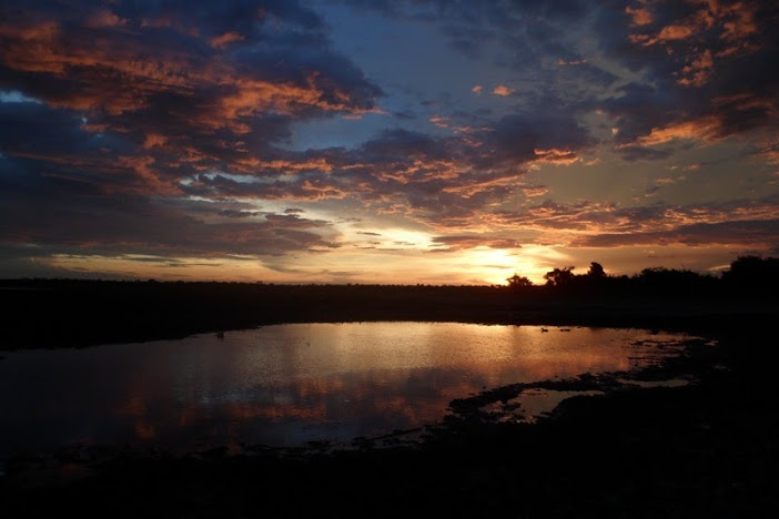 Esta imagen fue capturada en la Ciénaga de Hojancho, en el municipio bolivarense de San Fernando de Occidente.